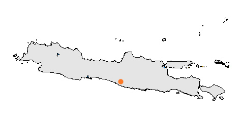 Locator Yogyakarta